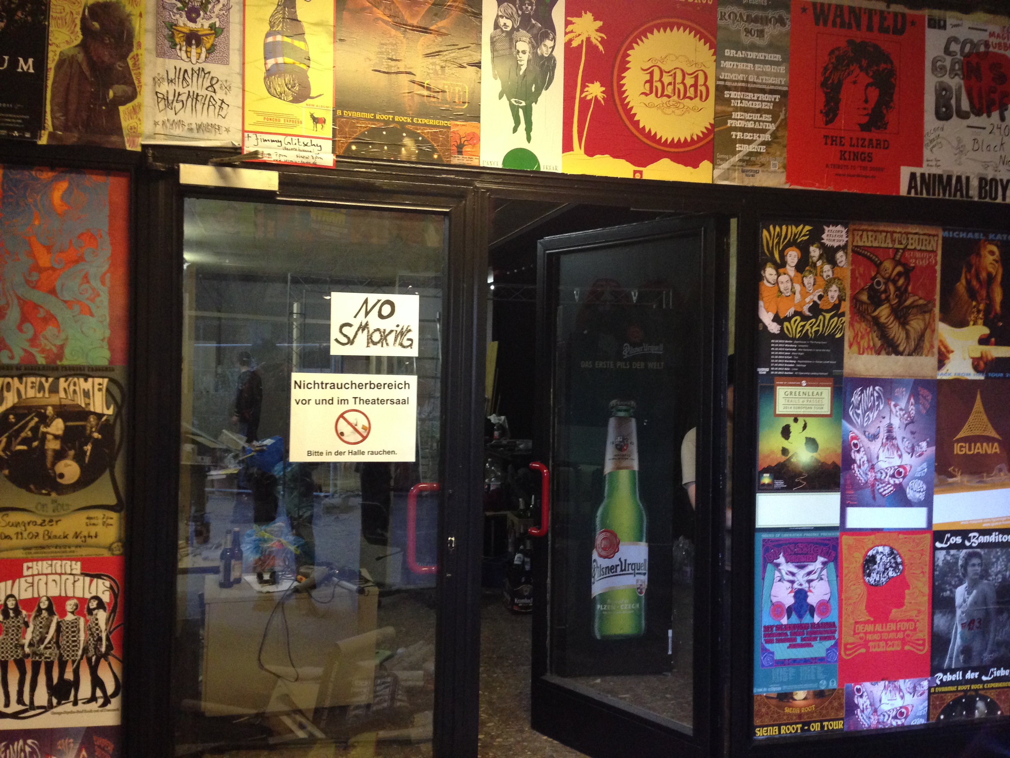 Theaterzugang im Kulturbahnhof Jena